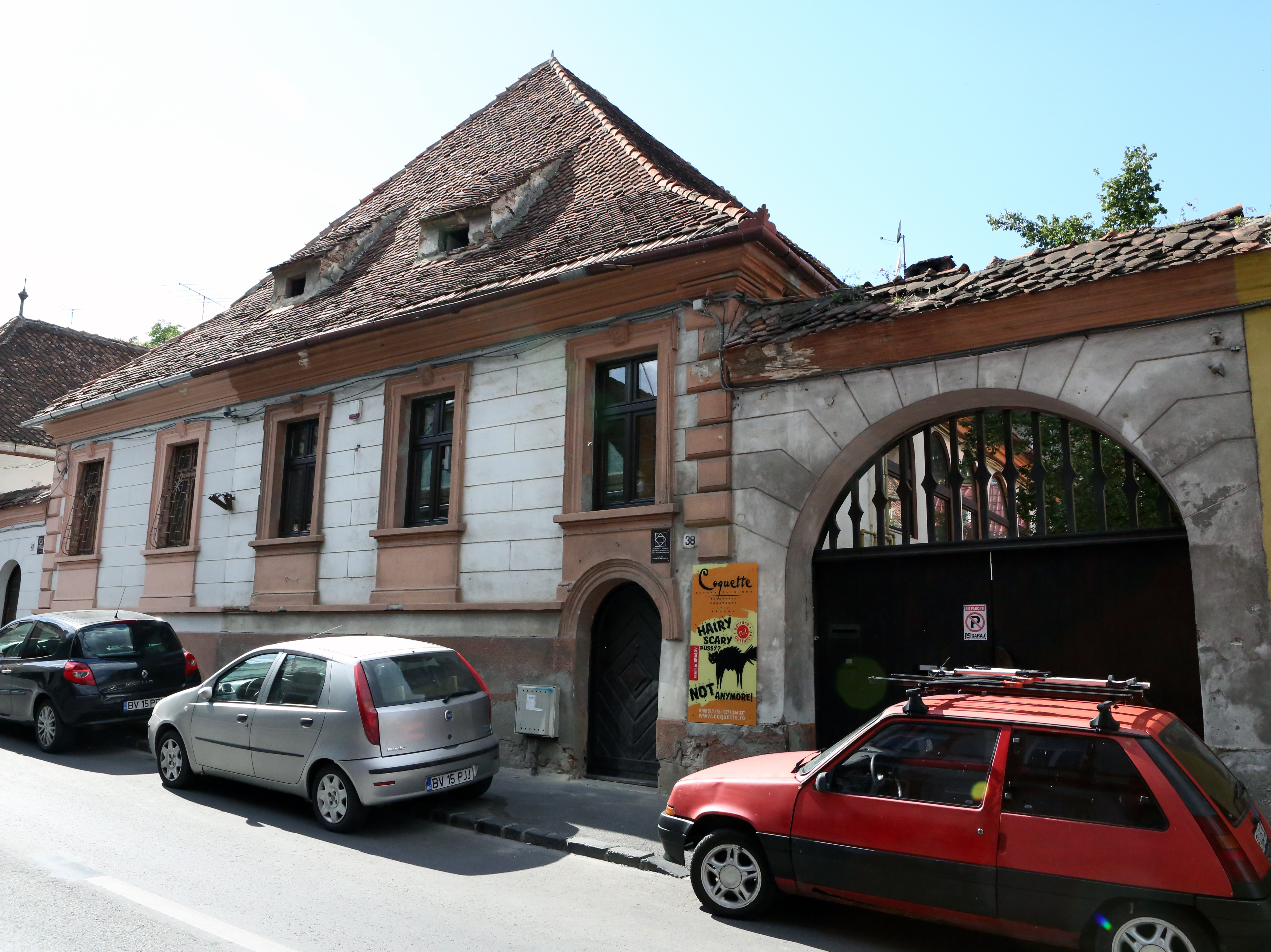 Casa de pe str. Brâncoveanu nr. 38, Brașov